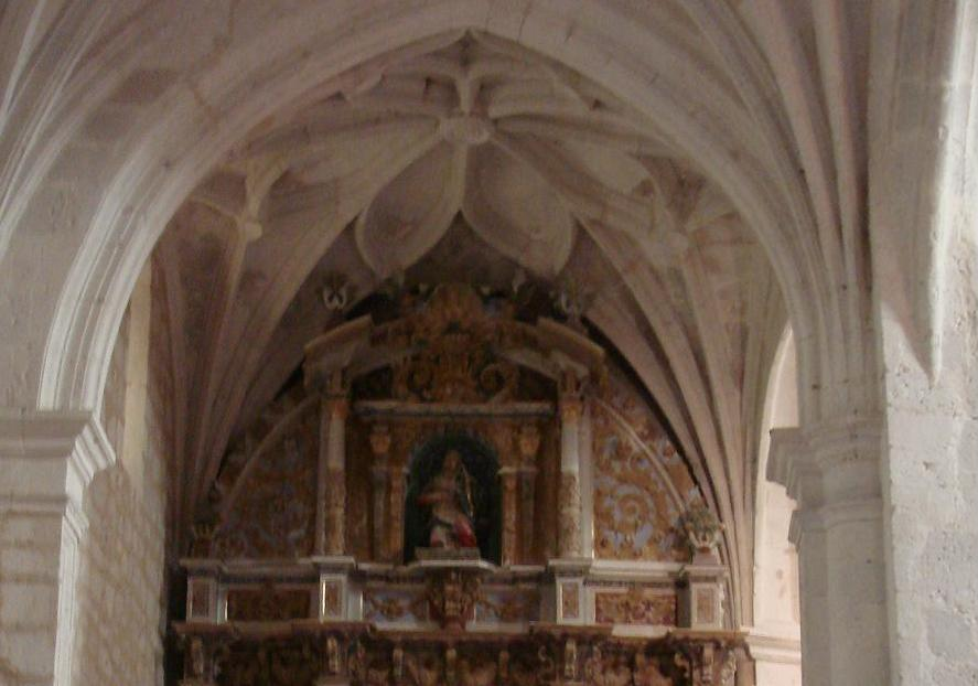 Talla de la Virgen Dolorosa del S.XVIII, en San Martín de Rubiales (Burgos, España)